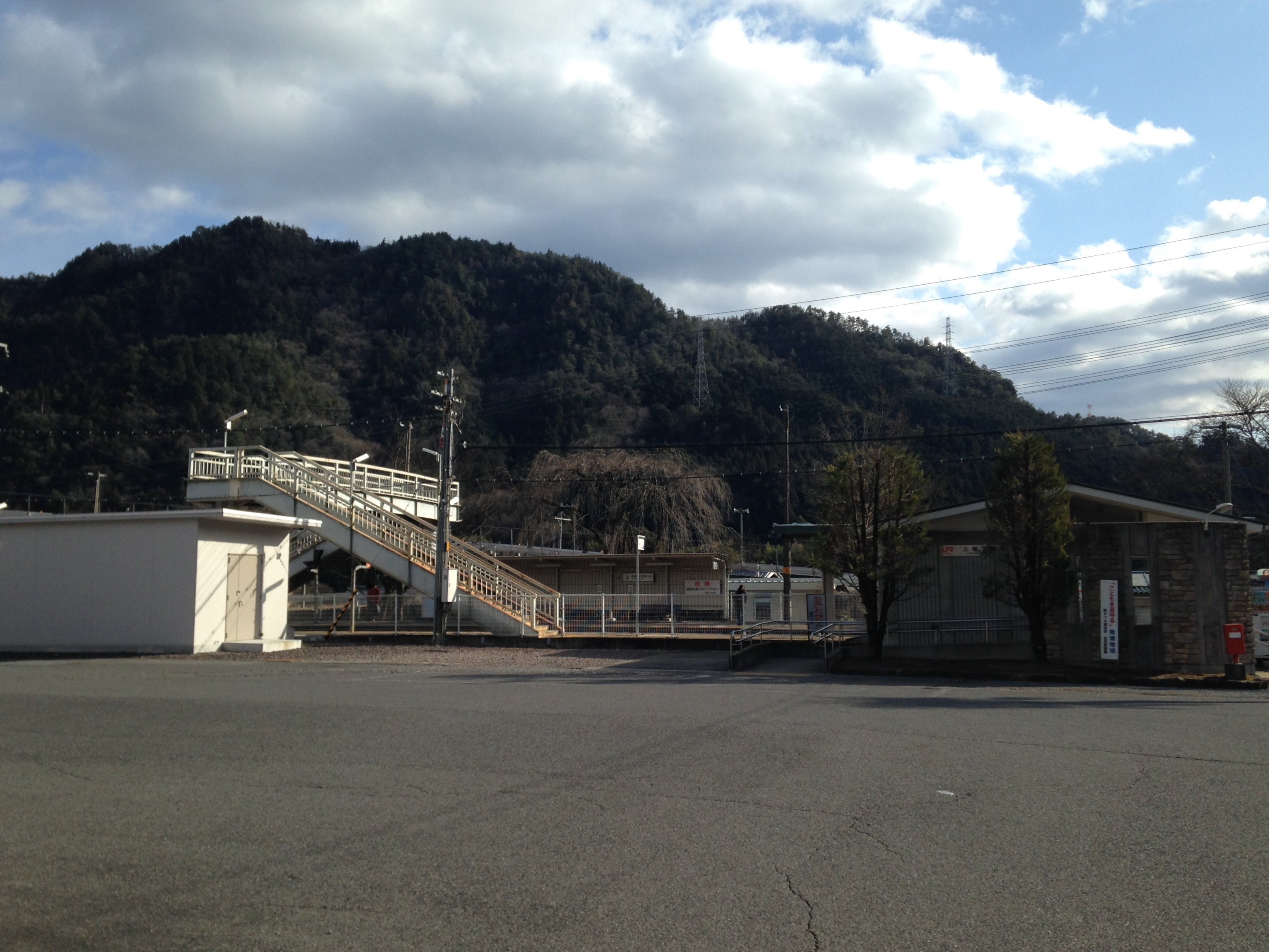 上麻生駅の遠景